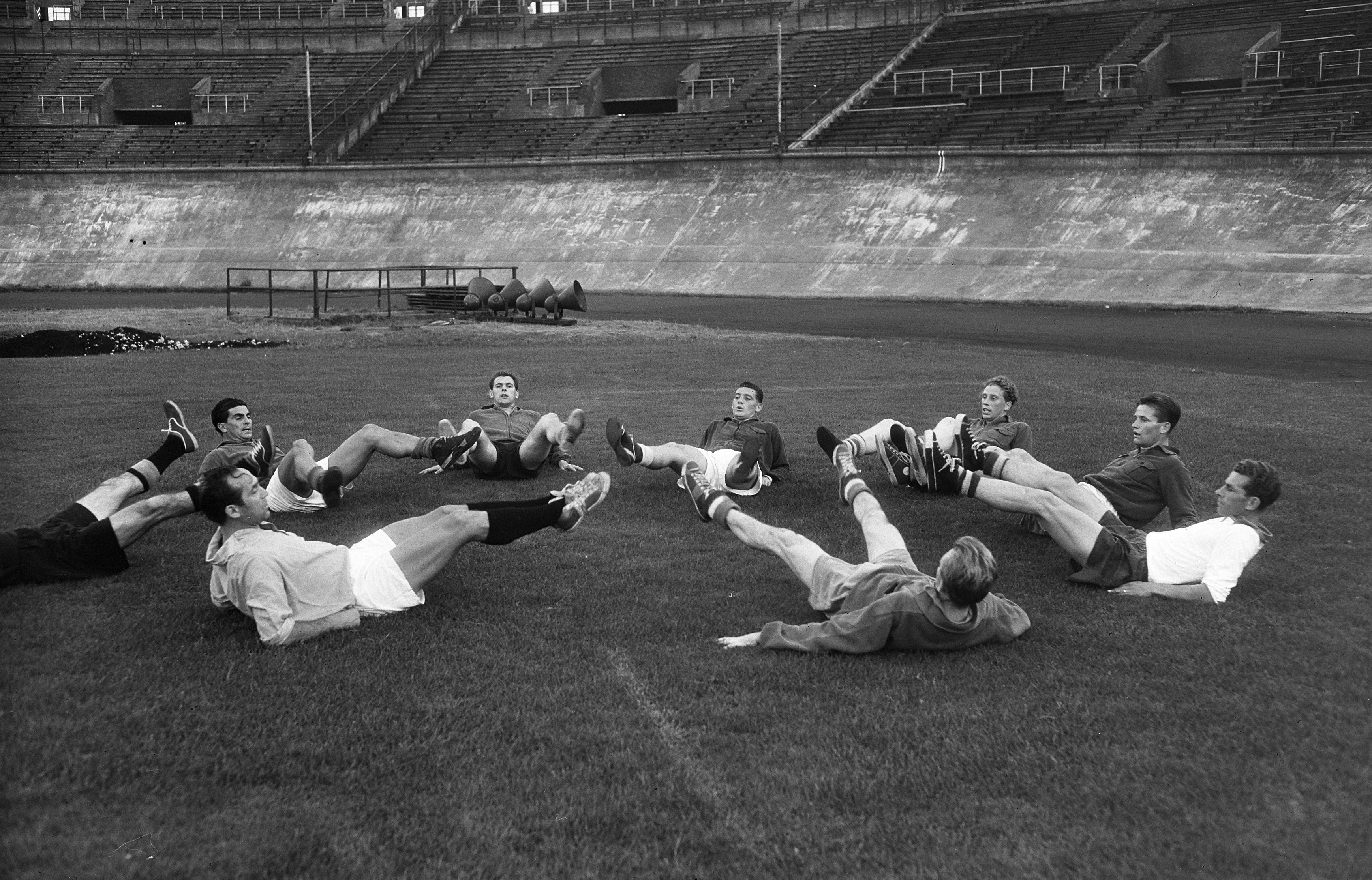 Collectie / Archief : Fotocollectie Anefo Reportage / Serie : [ onbekend ] Beschrijving : Training Nederlands elftal, gymnastiekoefeningen Datum : 6 september 1955 Locatie : Amsterdam, Noord-Holland Trefwoorden : sport, voetbal Fotograaf : Rossem, Wim van / Anefo Auteursrechthebbende : Nationaal Archief Materiaalsoort : Glasnegatief Nummer archiefinventaris : bekijk toegang 2.24.01.09 Bestanddeelnummer : 907-3130 Reacties Geplaatst door Maaike op 22 februari 2013 - 17:52. training o.l.v. Max Merkel (links, met zwarte voetbalkousen aan) Persoonsnamen: Max Merkel